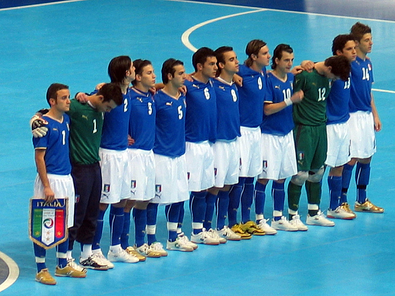 Nazionale di calcio a 5 dell'Italia Under-21. UEFA Under 21 Futsal Tournament 2008. Finale. Inno di Mameli.